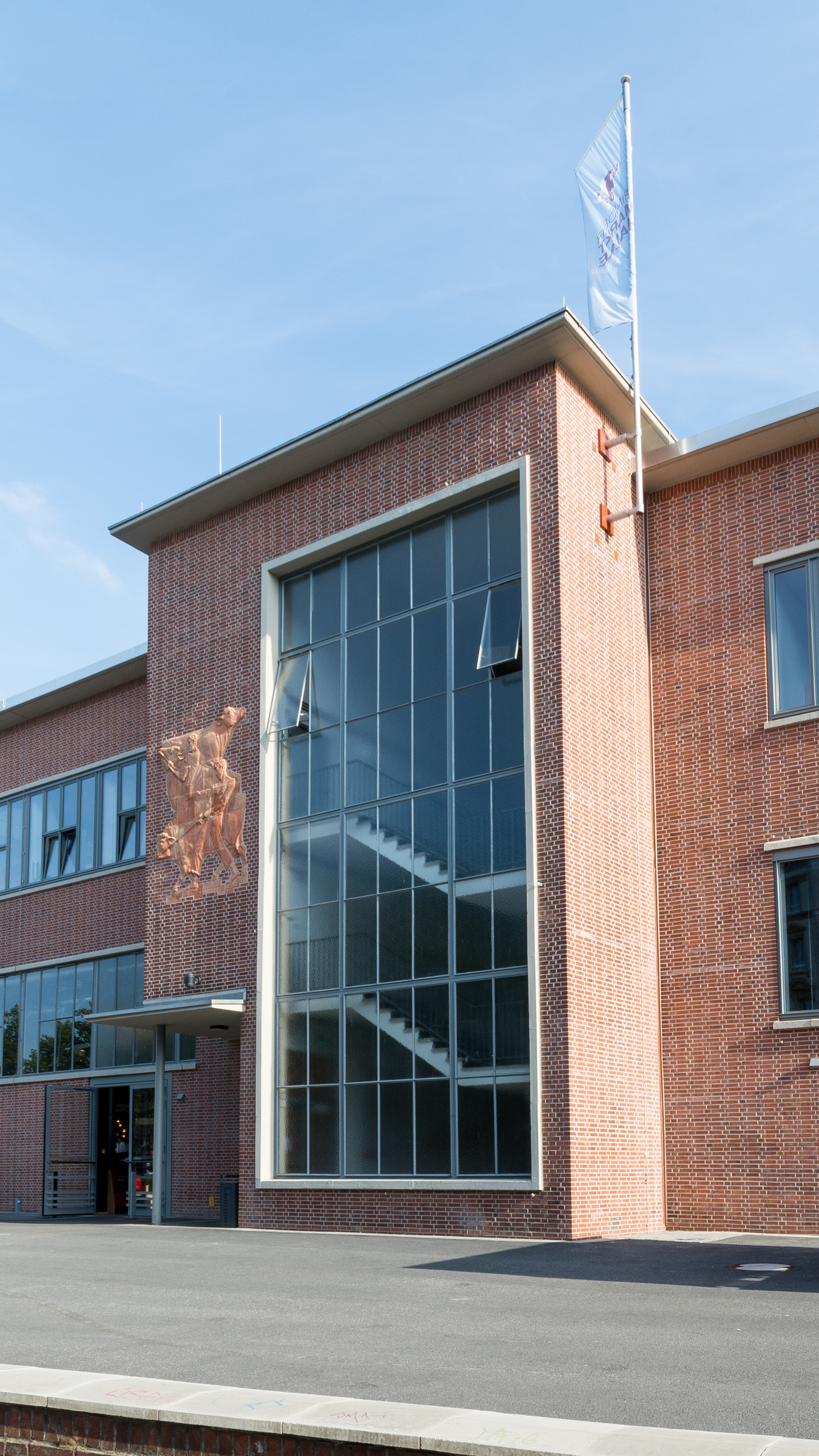 Rindermarkthalle in Hamburg-St. Pauli, westliches Treppenhaus. This is a photograph of an architectural monument.